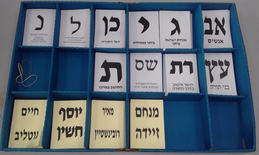 פתרי ההצבעה בבחירות 2018 ביתר עילית